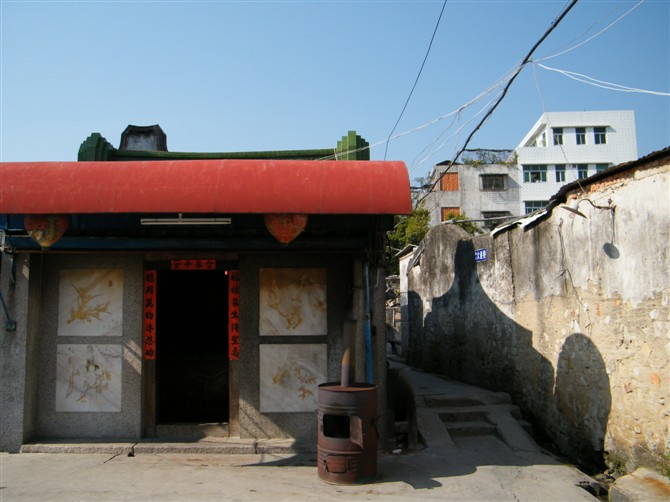 赤港福德古庙